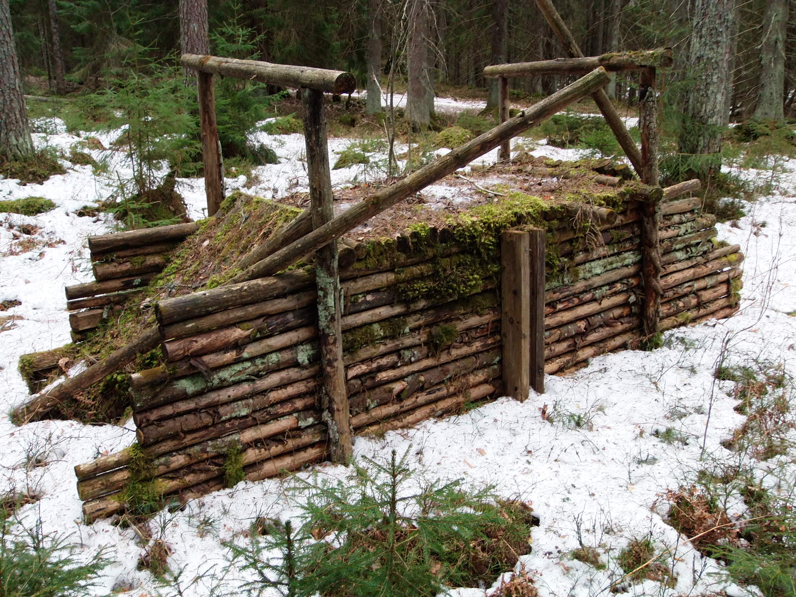 Norjalainen kettuloukku